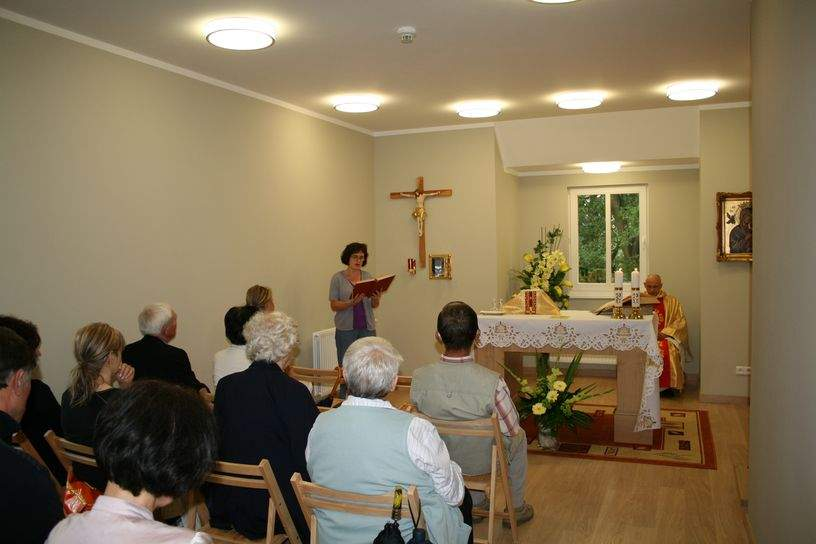 Szpital, 2009r. Msza święta w kaplicy